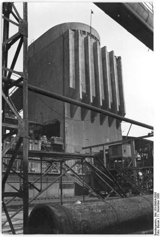 Magdeburg, Rothensee, Großgaserei Aufn.: Illus Biscan 11.12.1950 Werkanlage der Großgaserei Magdeburg-Rothensee Leihweise Illus Berlin W8